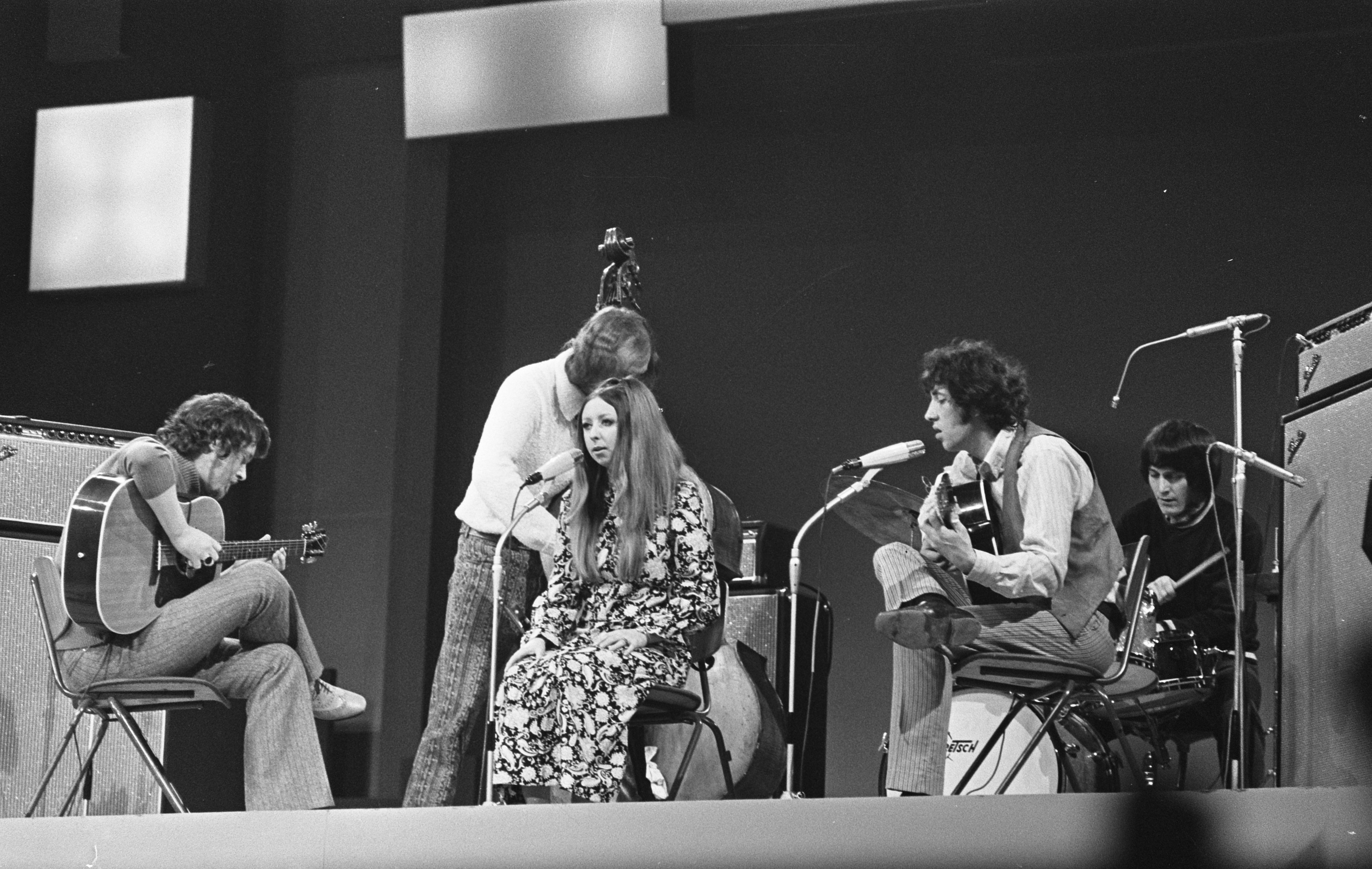 Collectie / Archief : Fotocollectie Anefo Reportage / Serie : Grand Gala du Disque Populaire in Congrescentrum Beschrijving : De Engelse folkgroep Pentangle Datum : 7 maart 1969 Trefwoorden : bands, folk, muziek Fotograaf : Fotograaf Onbekend / Anefo, [onbekend] Auteursrechthebbende : Nationaal Archief Materiaalsoort : Negatief (zwart/wit) Nummer archiefinventaris : bekijk toegang 2.24.01.05 Bestanddeelnummer : 922-1809